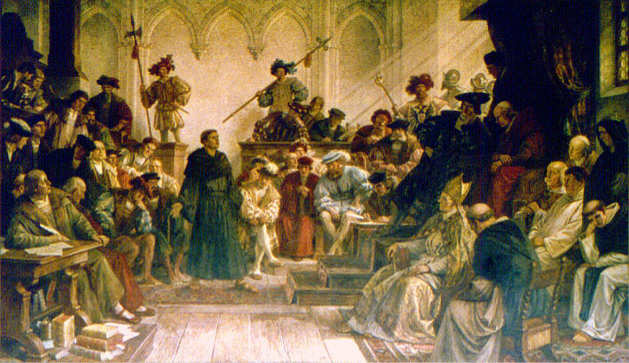 Luther vor Karl V. auf dem Reichstag zu Worms 1521. Wandgemälde (um 1880) von Hermann Wislicenus (1825-1899) in der Kaiserpfalz Goslar.